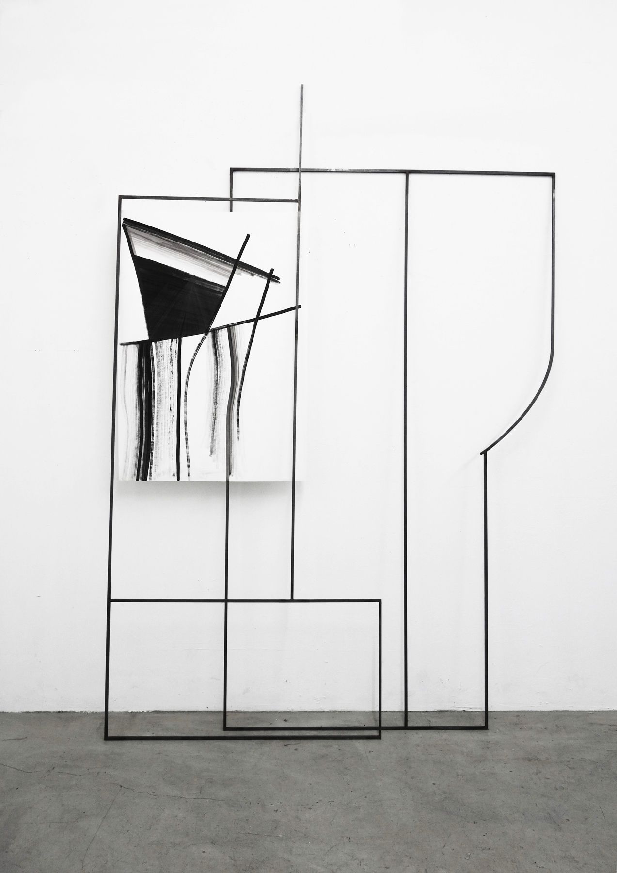 Nina Annabelle Märkl, Ornament und Off-Form, 250x160x30cm, Tusche auf Papier, Stahl, Magnete